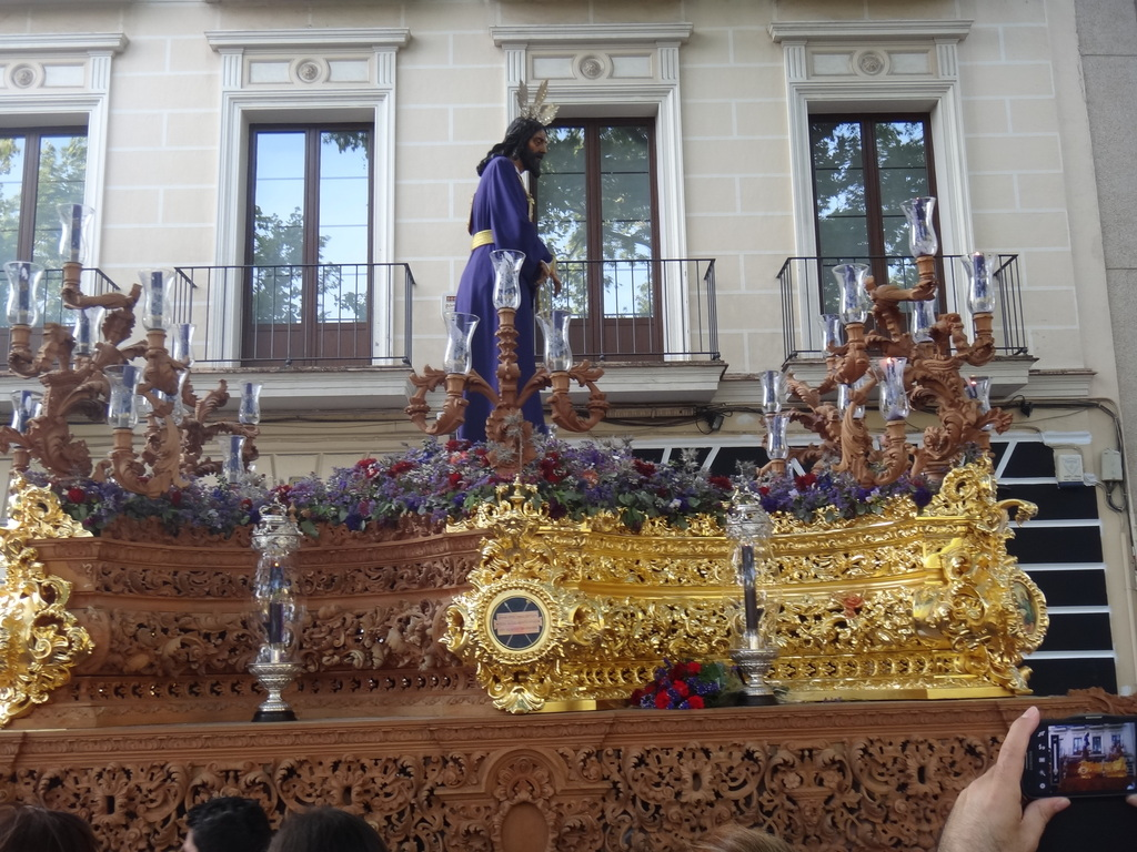 Semana Santa 2014, Jerez (Andalucía)